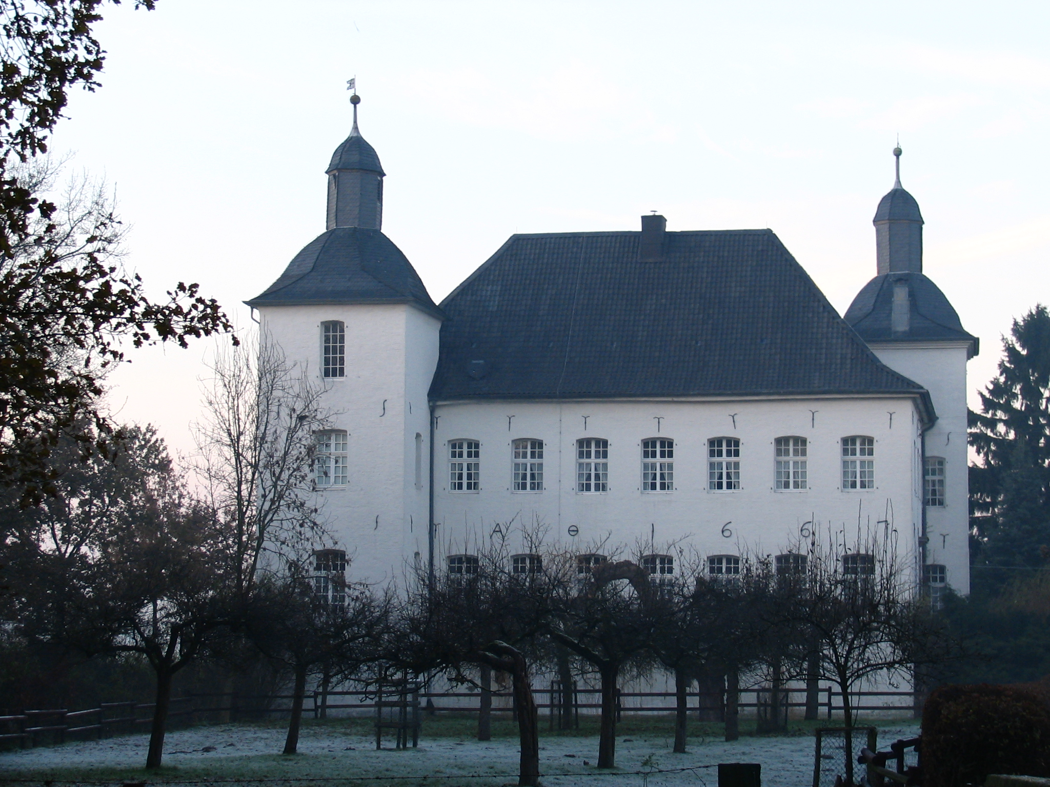 Die barocke Wasserburg Haus Neersdonk im Norden von Vorst